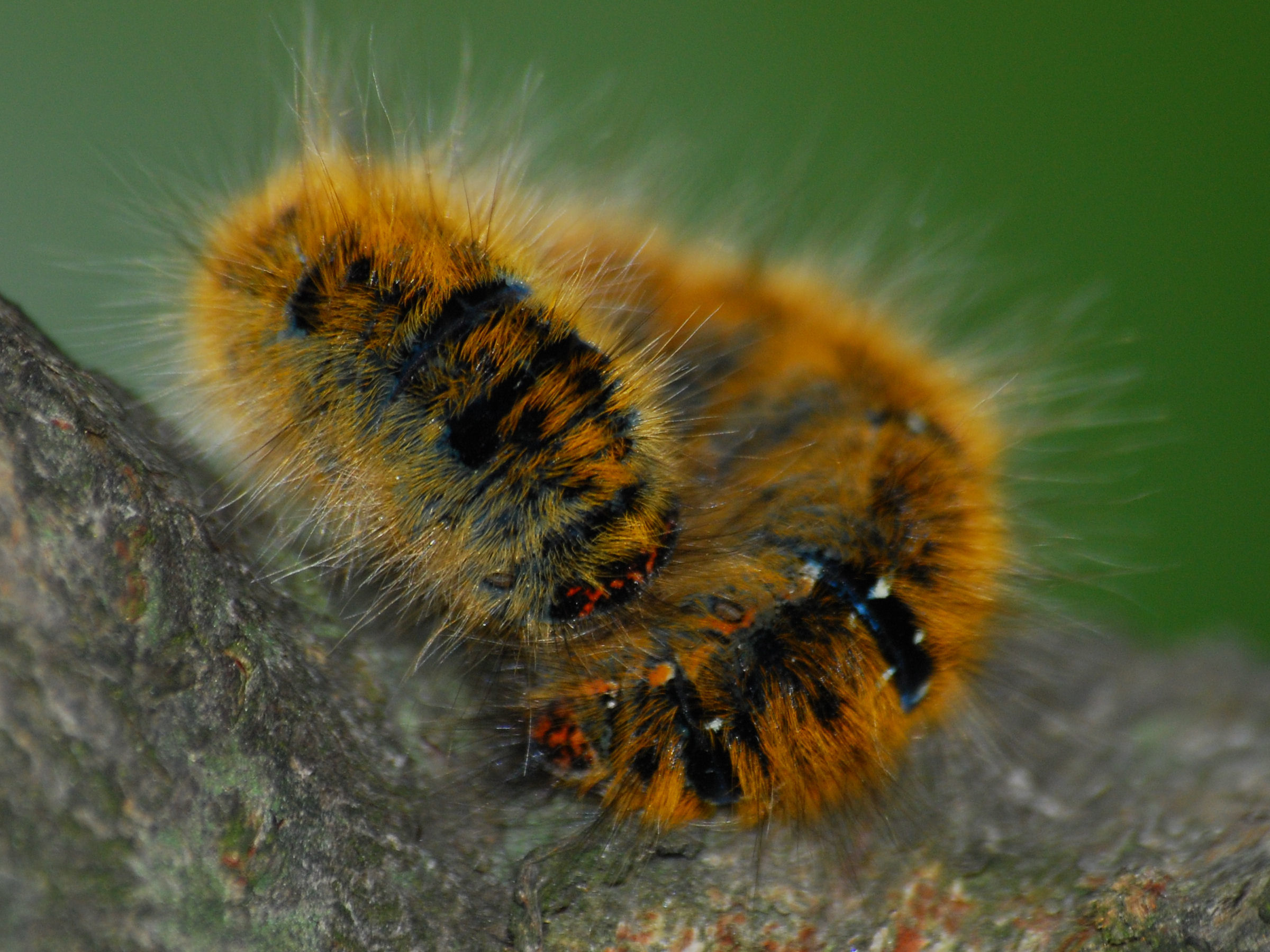 Barczatak koniczynówka (Lasiocampa trifolii)